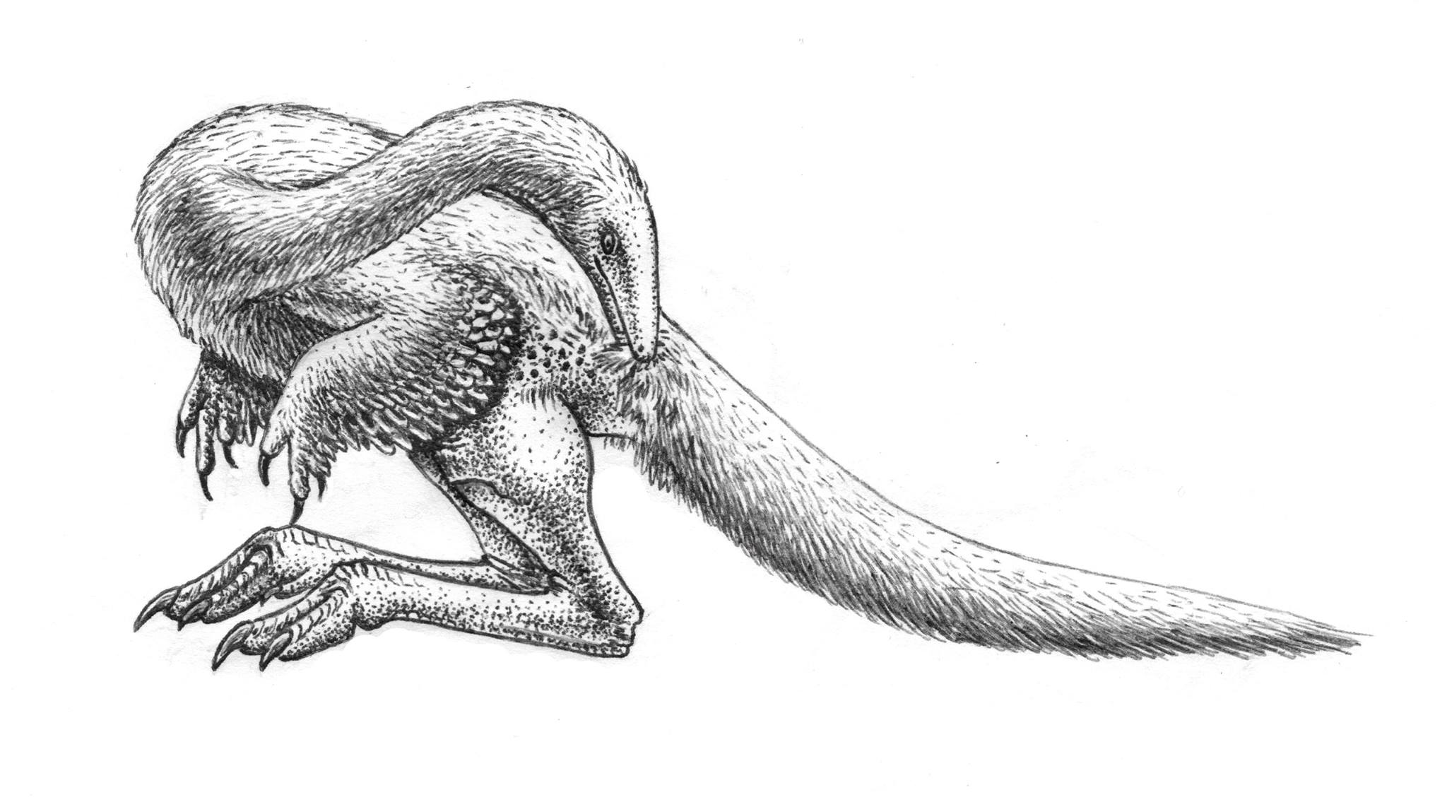 Орнитомим